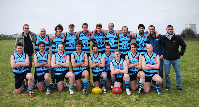 Blues årgång 2010